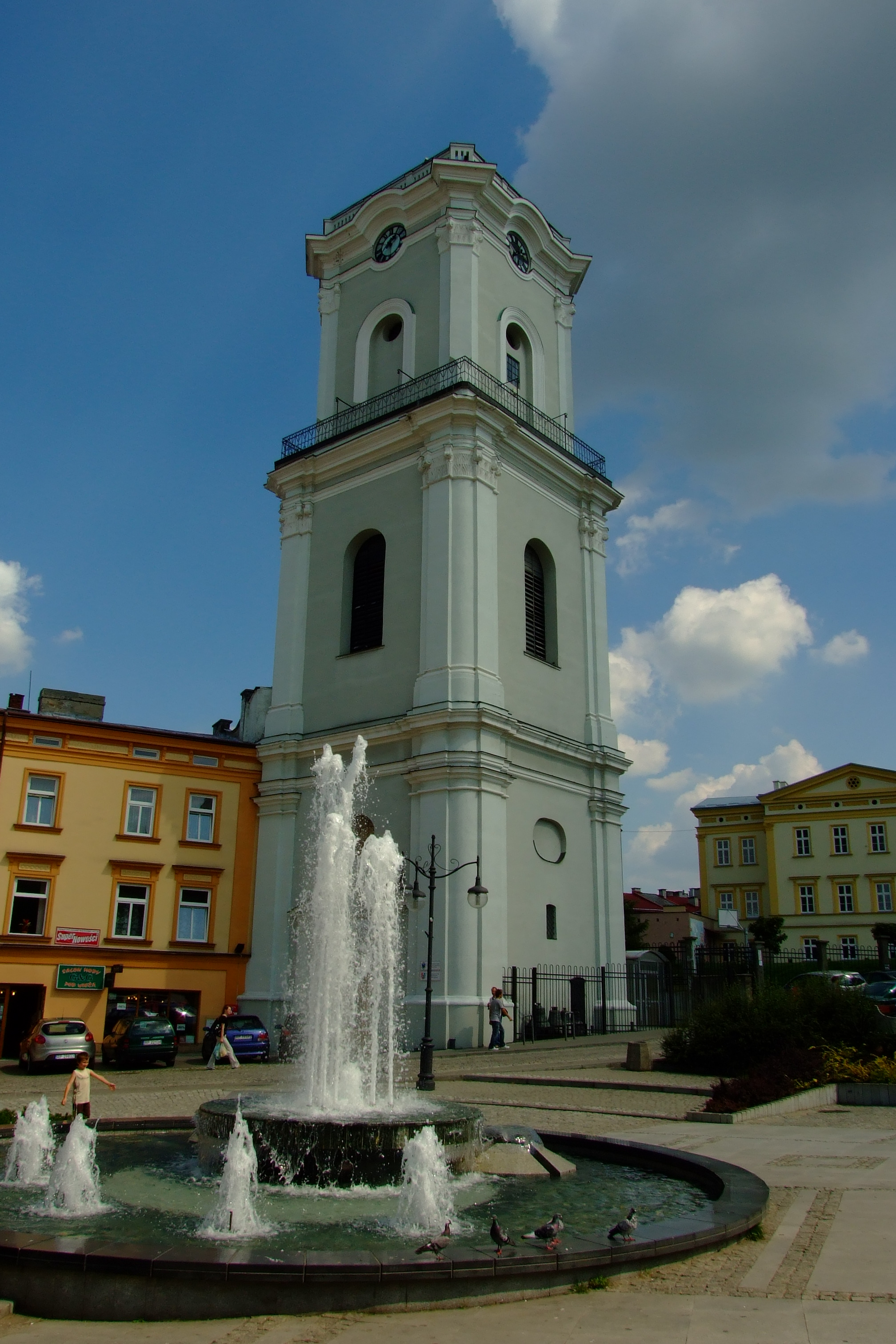 Przemyśl - wieża cerkiewna, tzw. Zegarowa